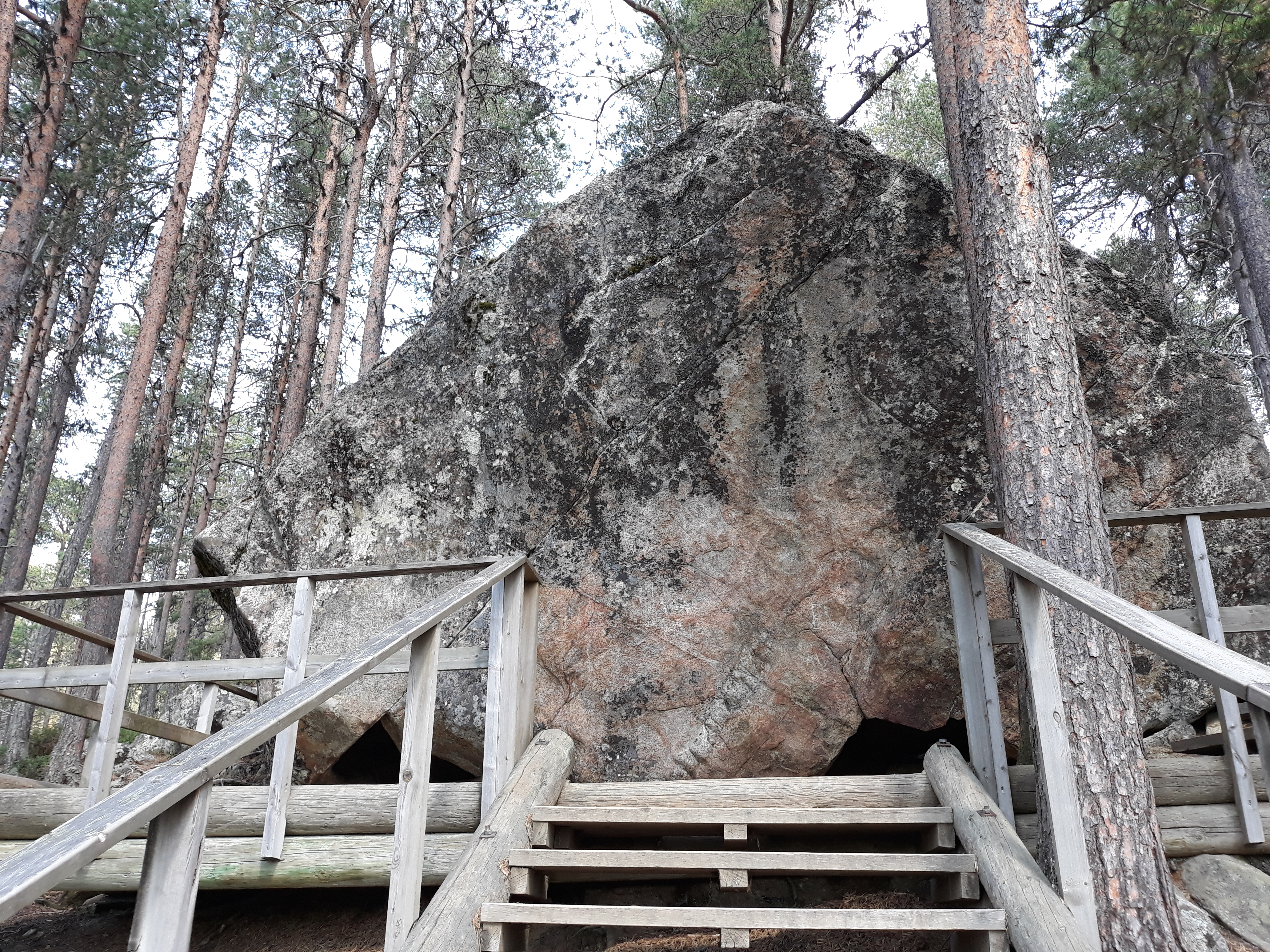 Karhunpesäkivi Inarissa.